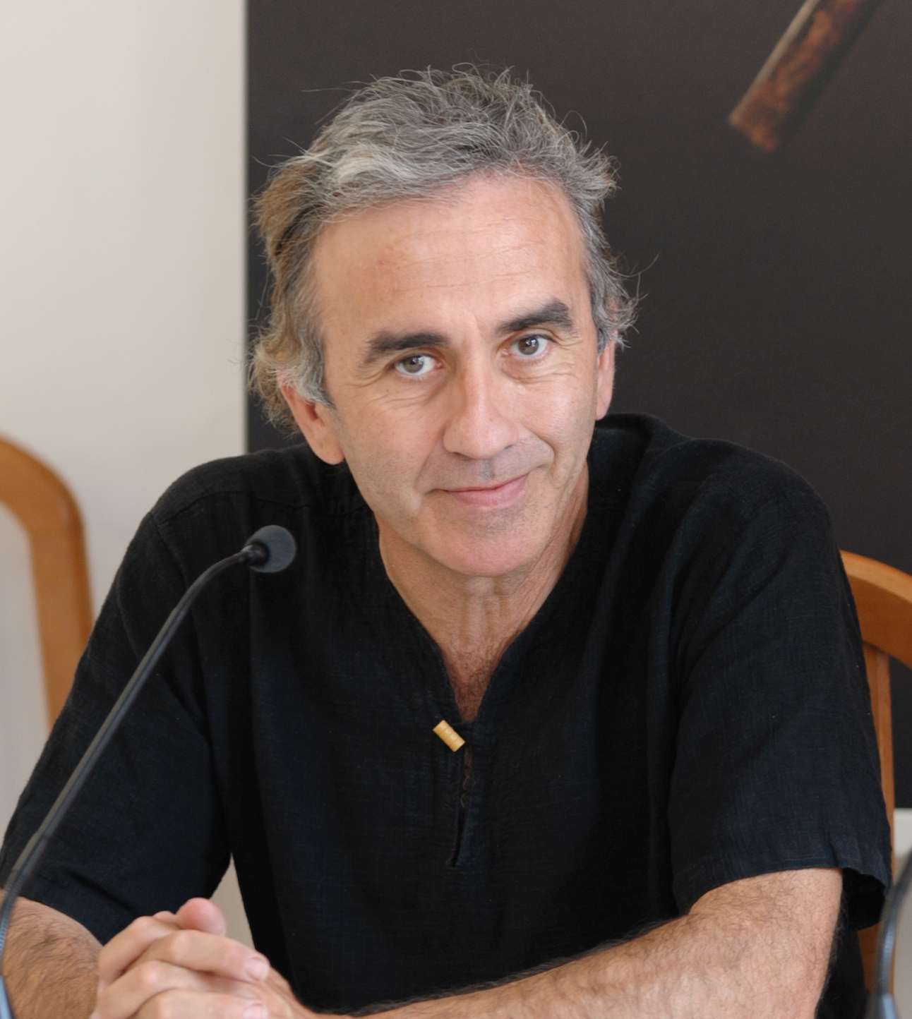 Ricardo Iniesta, director del Centro TNT, dramaturgo y director teatral.